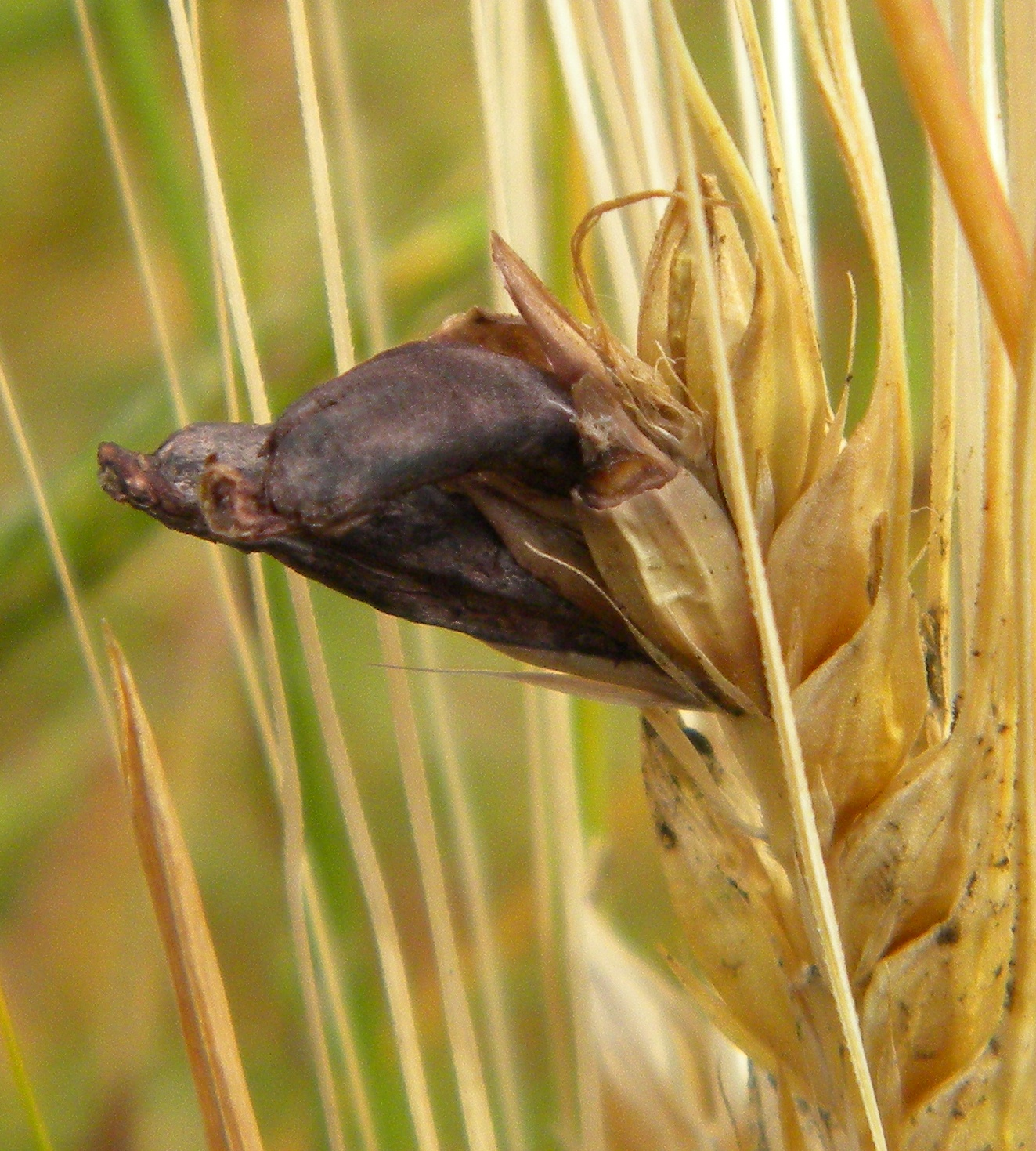 Ergot sur orge (Bretenière)